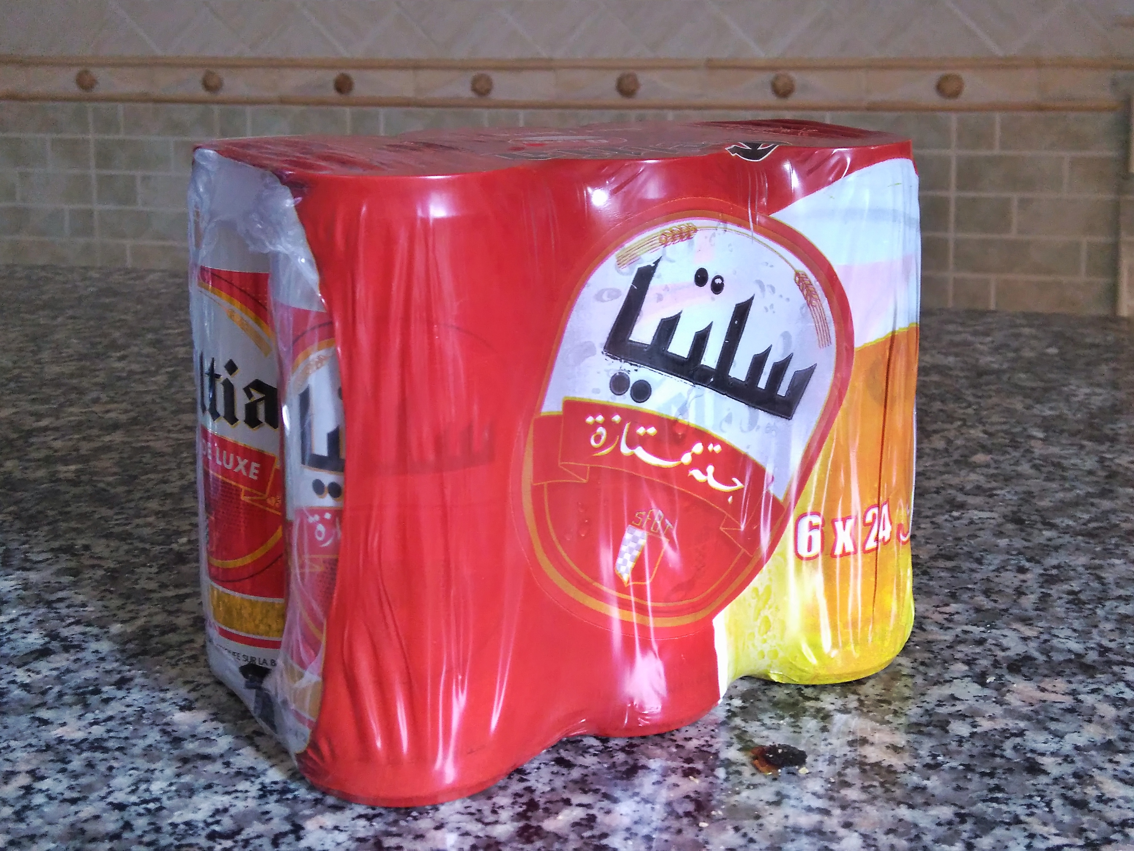 Celtia en package